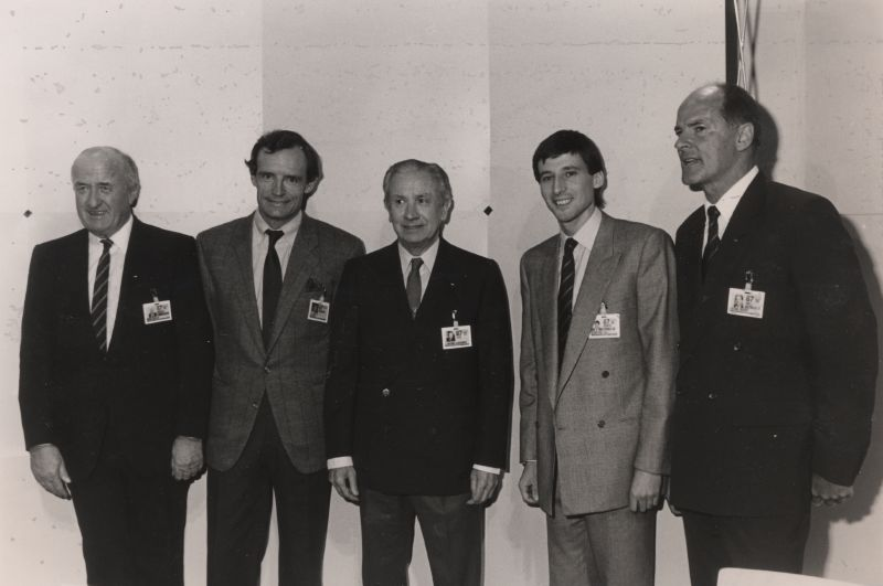 Juan Antonio Samaranch, Jean Claude Killy, Sebastian Coe Copyright World Economic Forum ([1])